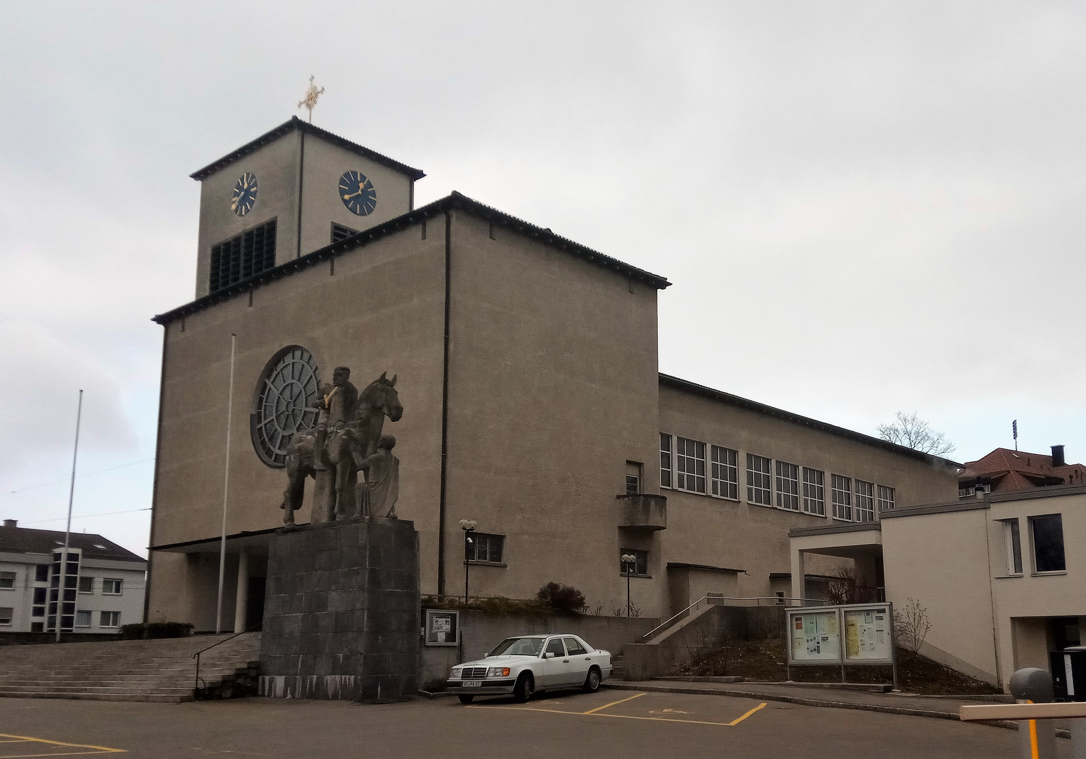 Die St. Martinskirche von Südwesten gesehen. Mit St. Martins-Denkmal, Rechts das kirchengemeindehaus